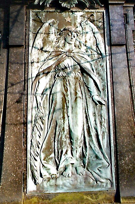 Engel des Minlos'schen Grabmals auf dem Burgtorfriedhof zu Lübeck